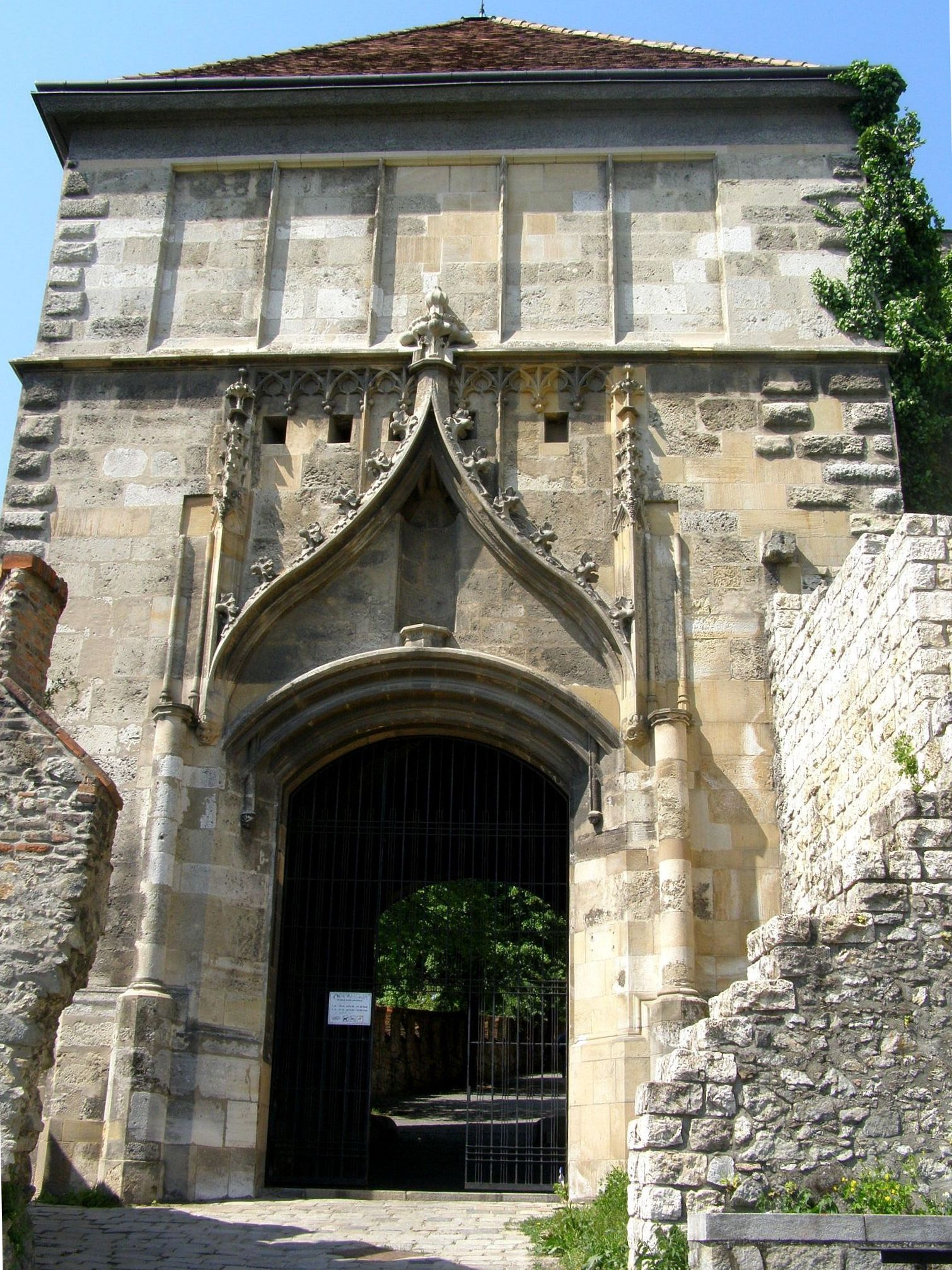 Žigmundova brána z východu - celkový pohľad